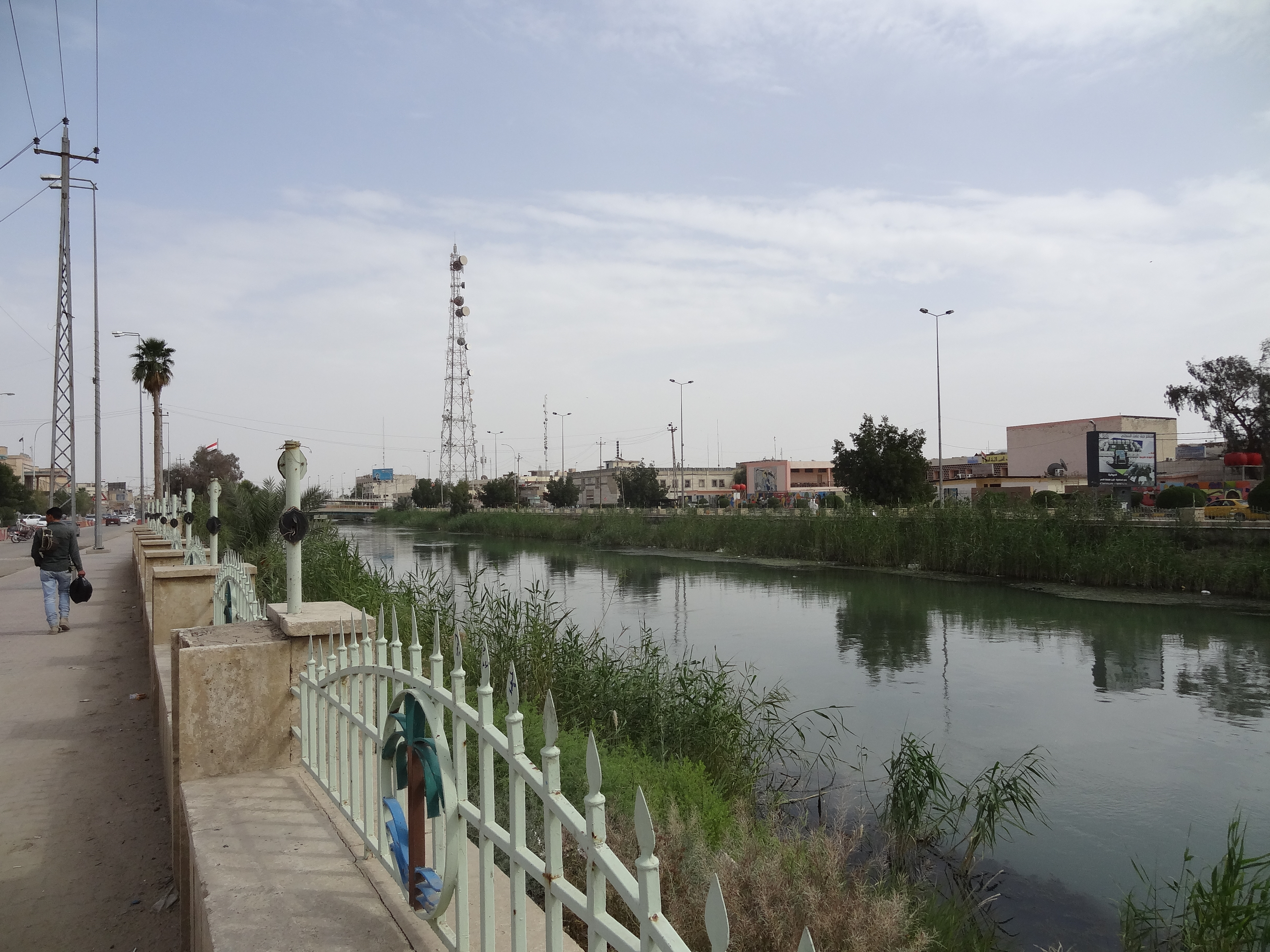 Hello I Sajjad al-Khafaji, from Iraq live in the city of Diwaniyah, the pictures of my city where I live and where the image of the river that passes through the city of Diwaniyah, the people of Diwaniya he calls "the Shatt al-Diwaniya"الشجرة التين والأغنام